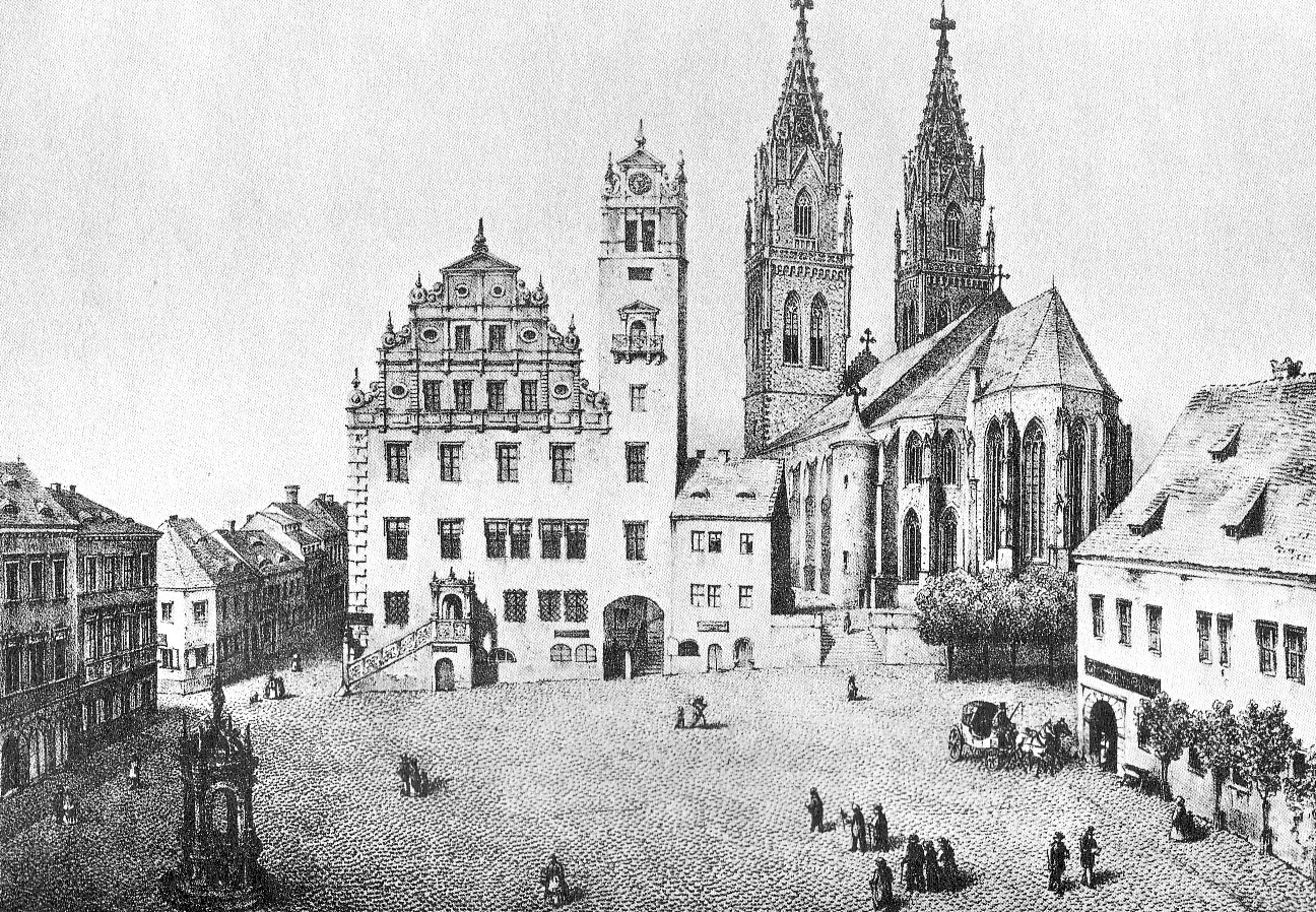 Historische Ansicht von Oschatz in Sachsen. Stahlstich.